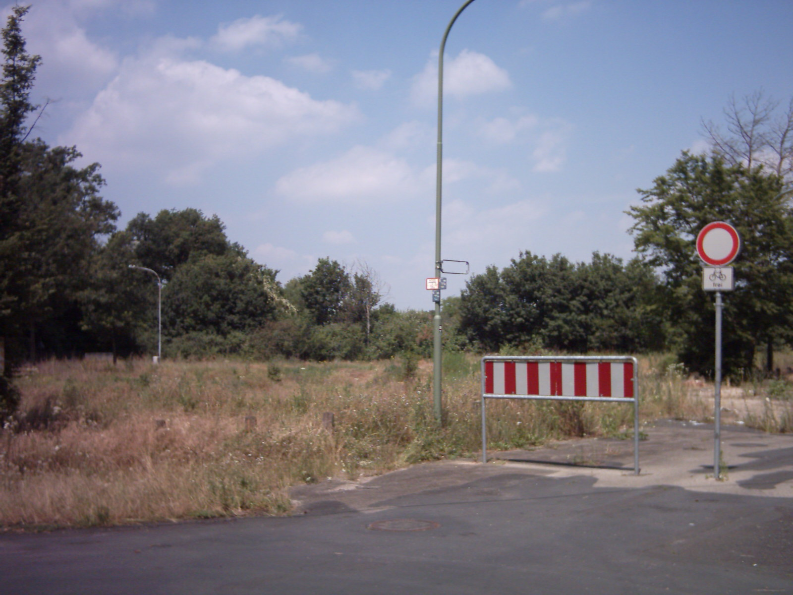 Der ehemalige Offenbacher Stadtteil Lohwald. Längst wächst Gras über dem ehemaligen sozialen Brennpunkt.